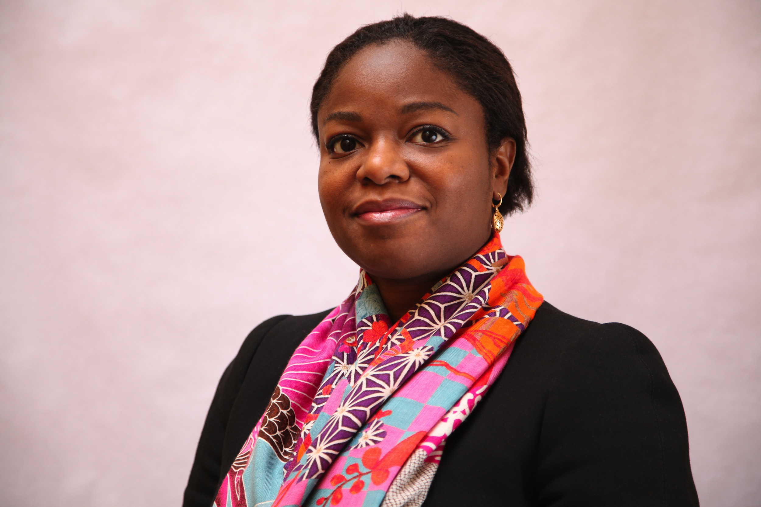 Portrait de Cina Lawson en 2012